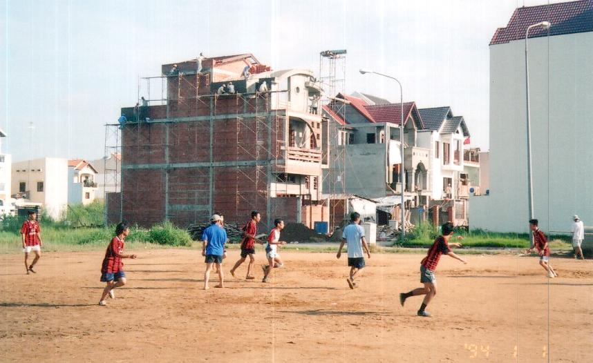 Hình tự chụp bằng máy ảnh cá nhân